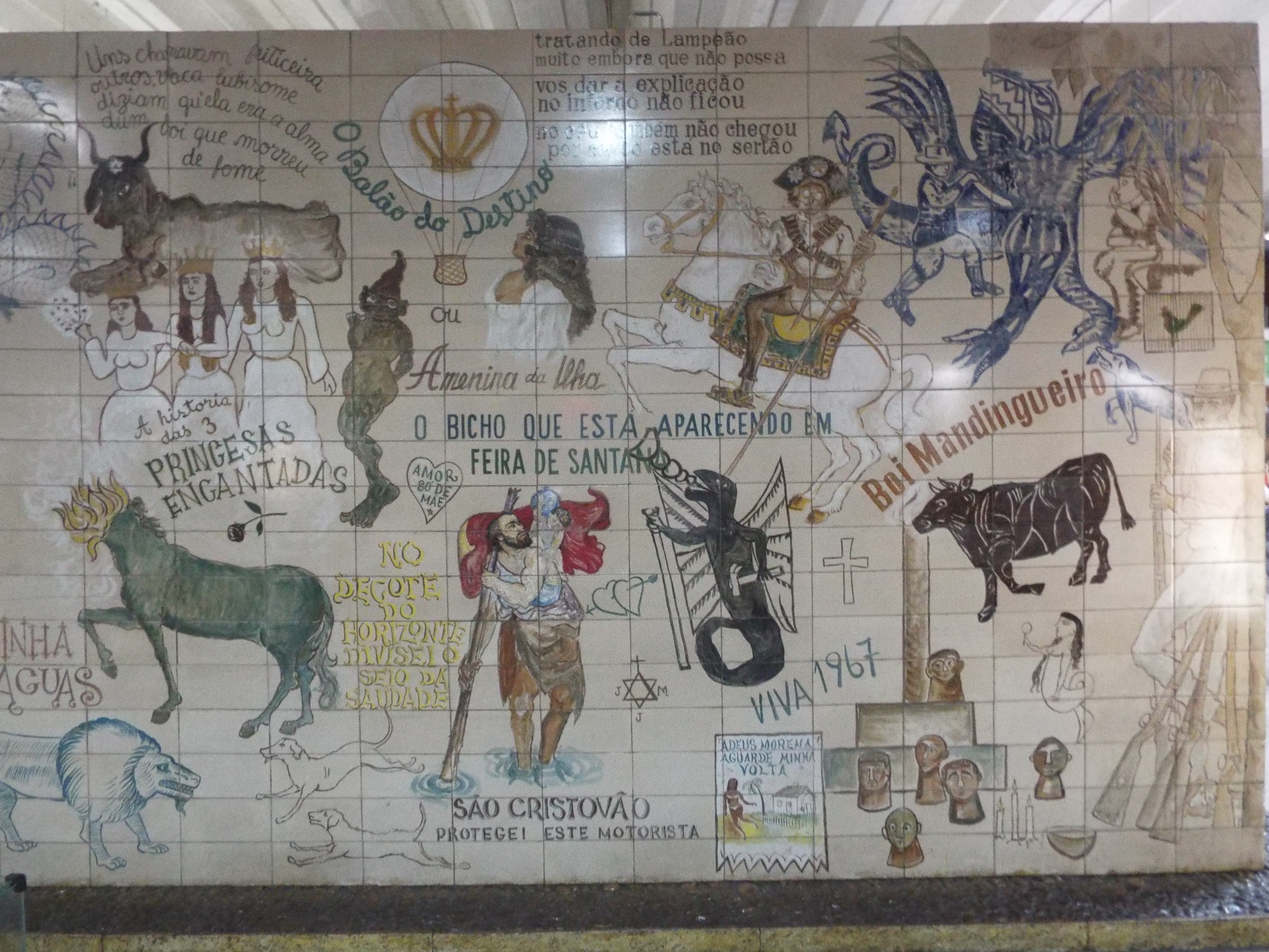 mural da rodoviária de feira de santana